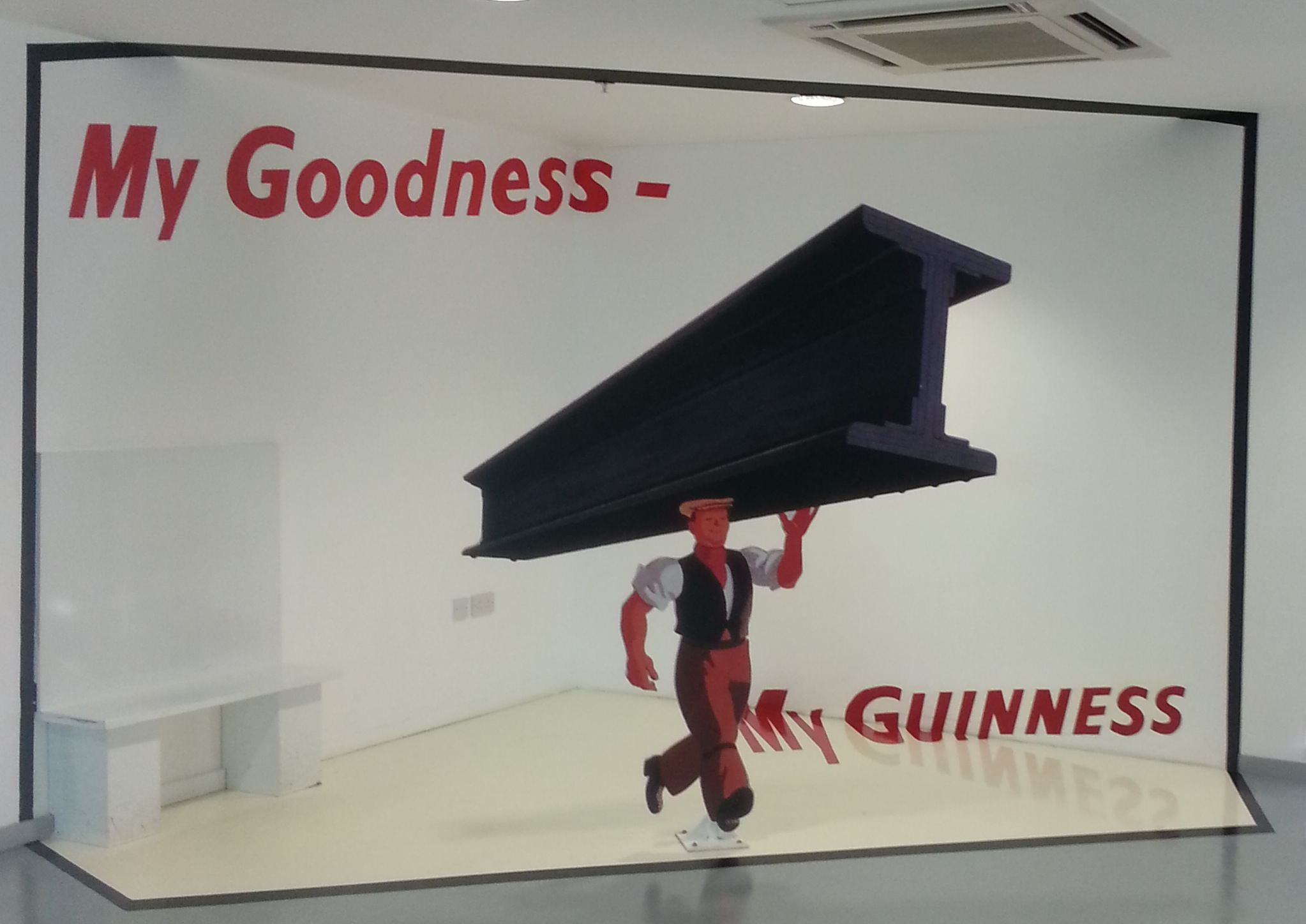 Publicité Guiness au Guiness Storehouse de Dublin